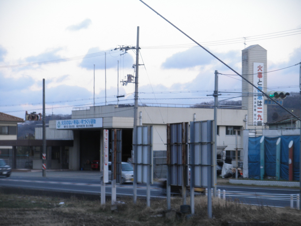 三木消防署吉川分署